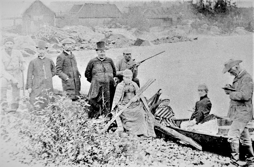 Voyage du curé Labelle à Chute-aux-Iroquois « Cette photographie représente un voyage d’exploration du curé Labelle à Chute-aux-Iroquois (aujourd’hui Labelle). De gauche à droite on aperçoit A.B. Filion, agent des Terres et des Bois de la Couronne – agence Petite-Nation Est, le curé Samuel Ouimet de Saint-Jovite, l’honorable Georges Duhamel, commissaire des Terres de la Couronne, le curé Labelle, le fidèle Isidore Martin, Arthur Buies prenant des notes, ainsi que d’autres personnes non identifiées. Lors de ces voyages, une partie du trajet se faisait en carriole, mais compte tenu de l’état des routes à cette époque, il fallait poursuivre son chemin à pied et en canot. »